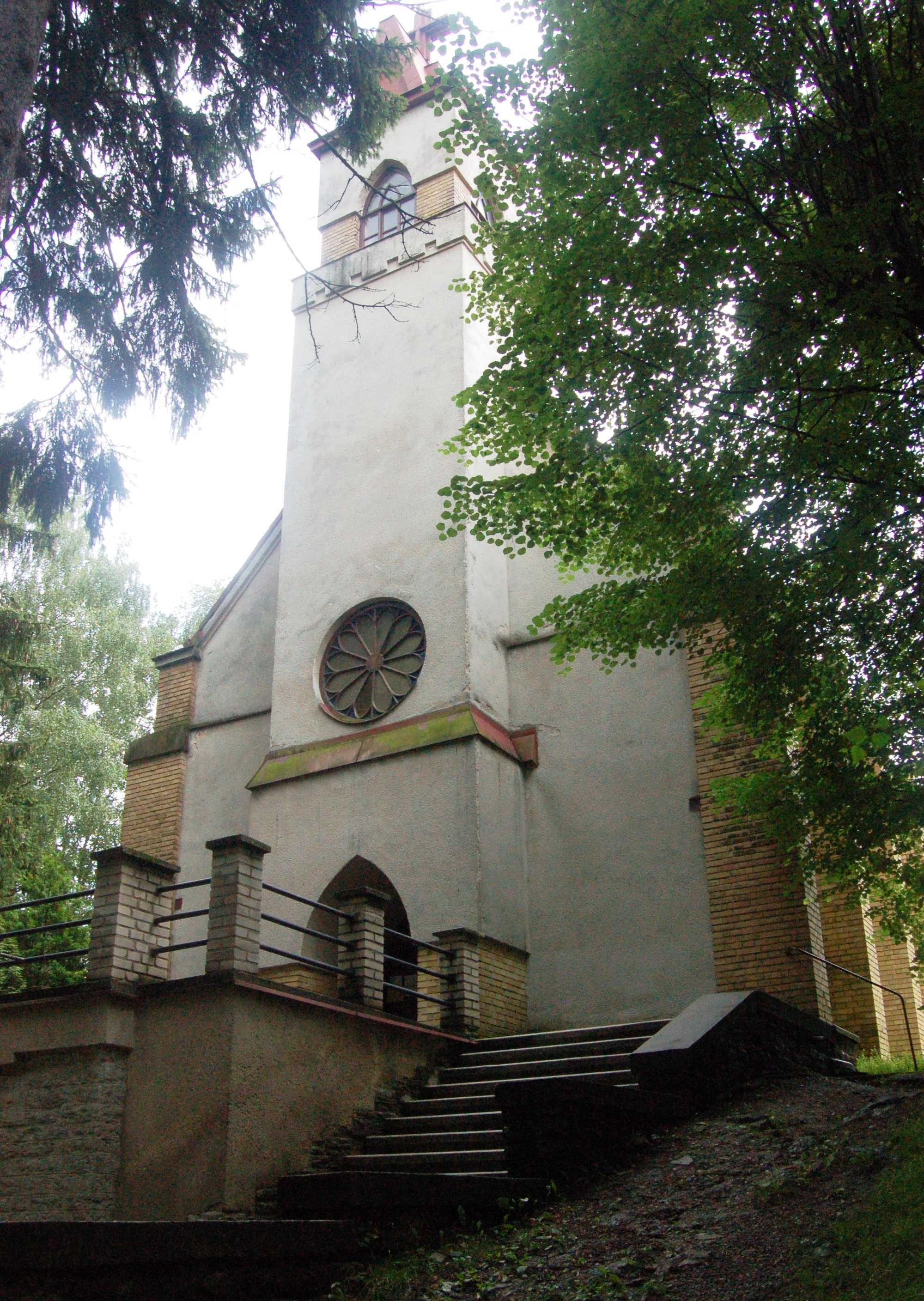 Česky: Rokole - kostel Panny Marie